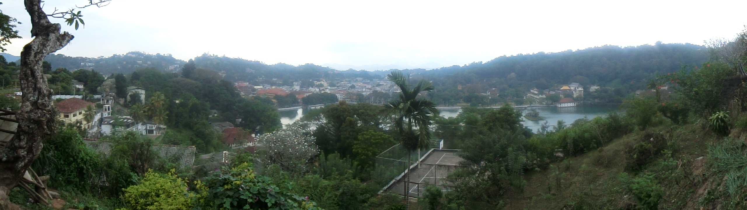 Kandy, Sri Lanka